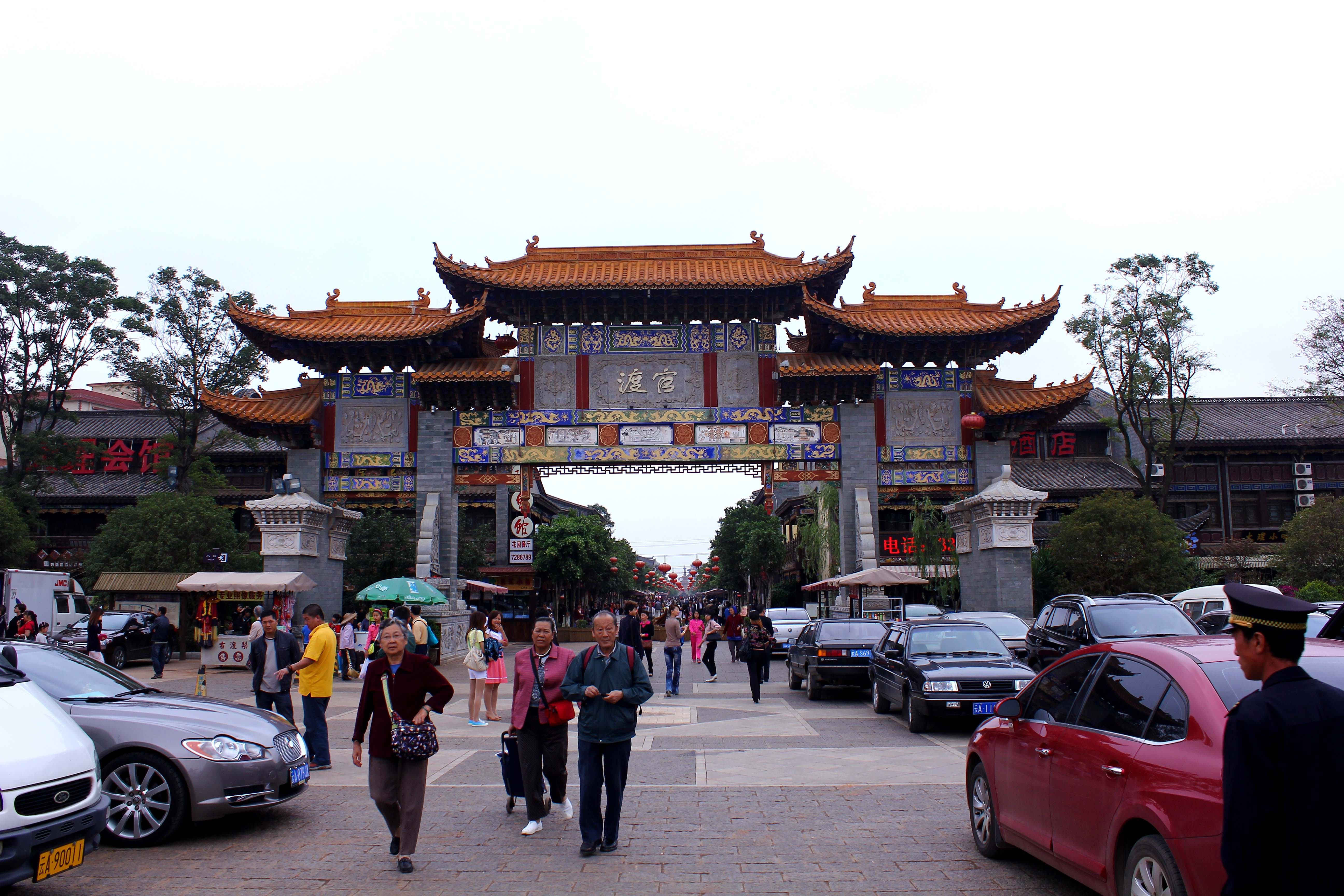 云南昆明官渡古镇